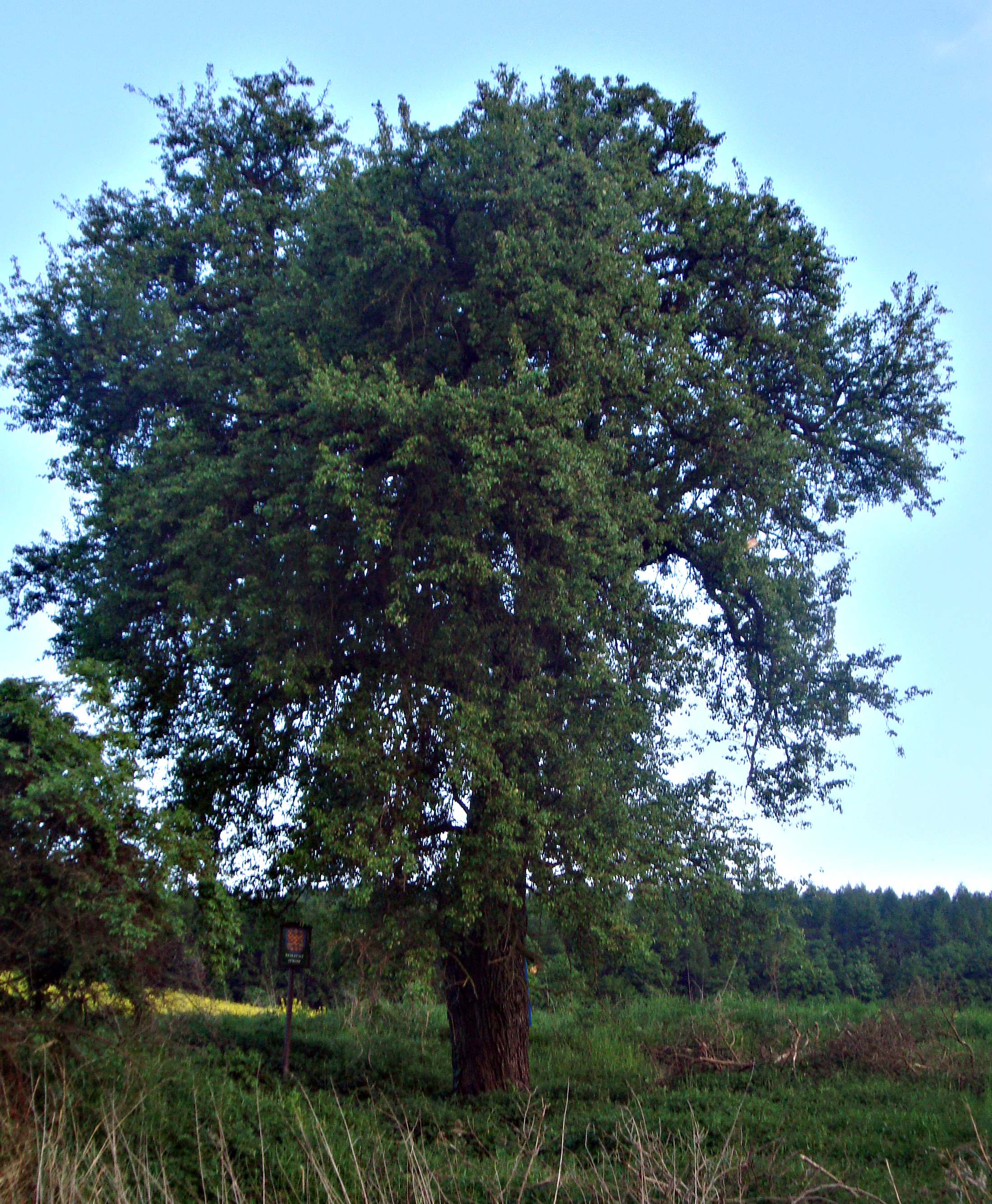 Památný strom Hrušeň pod Oborou